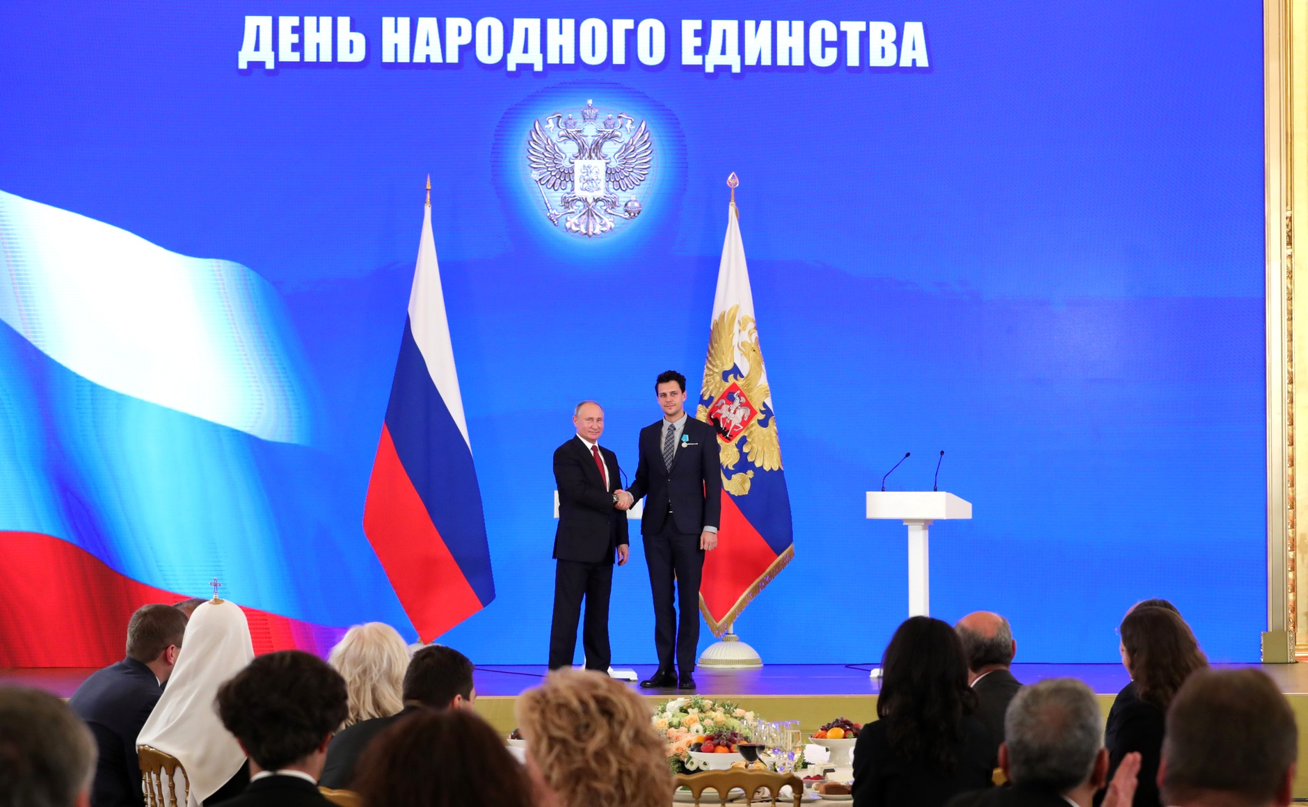 Приём по случаю Дня народного единства. Церемония вручения государственных наград России иностранным гражданам. Медалью Пушкина награждён актёр Сербского национального театра Милош Бикович.